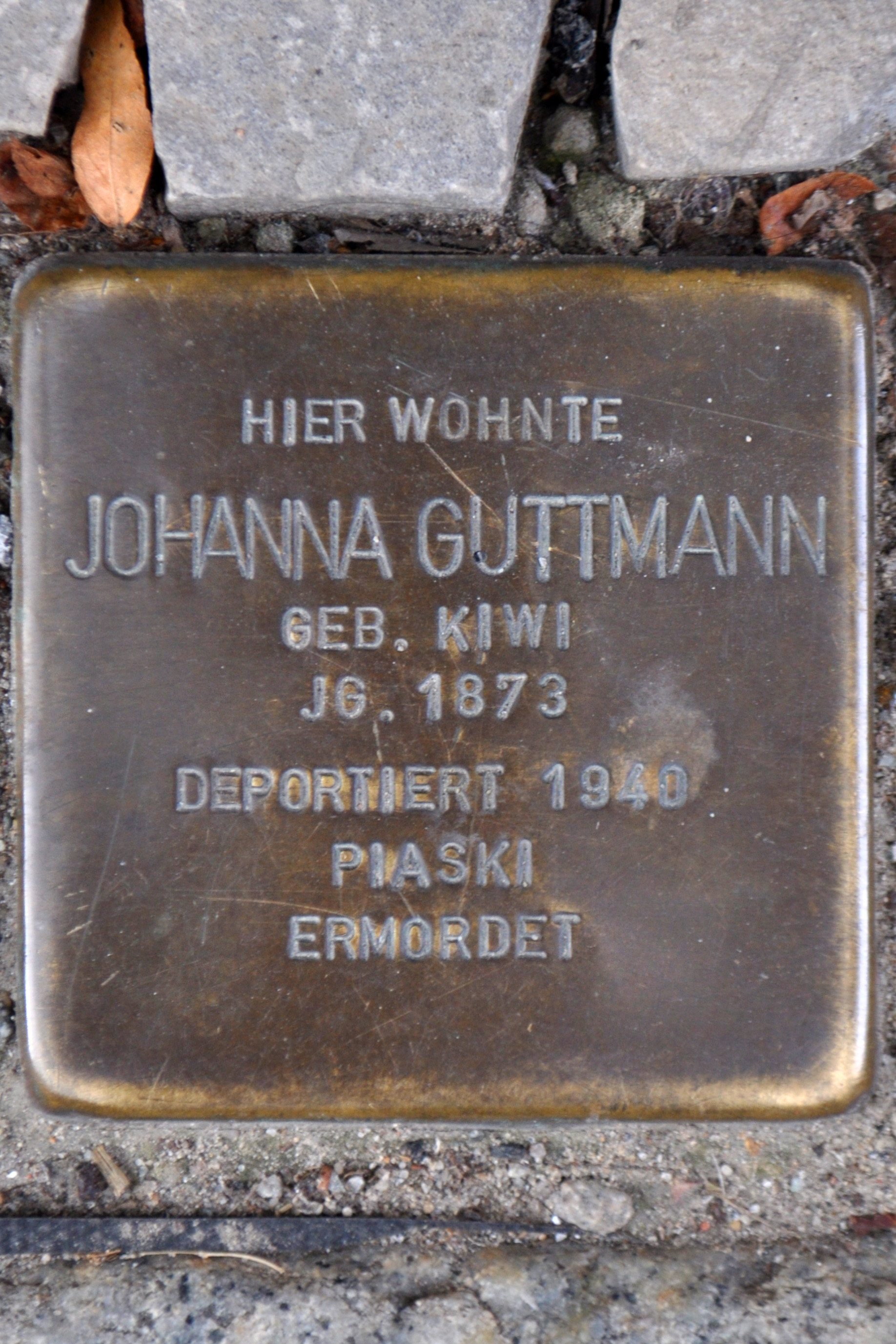 Stolperstein in Stralsund, Tribseer Straße. Der Stein ist einer von zwei Stolpersteinen an diesem Ort. Text: Hier wohnte Johanna Guttmann geb. Kiwi Jg. 1873 deportiert 1940 Piaski ermordet